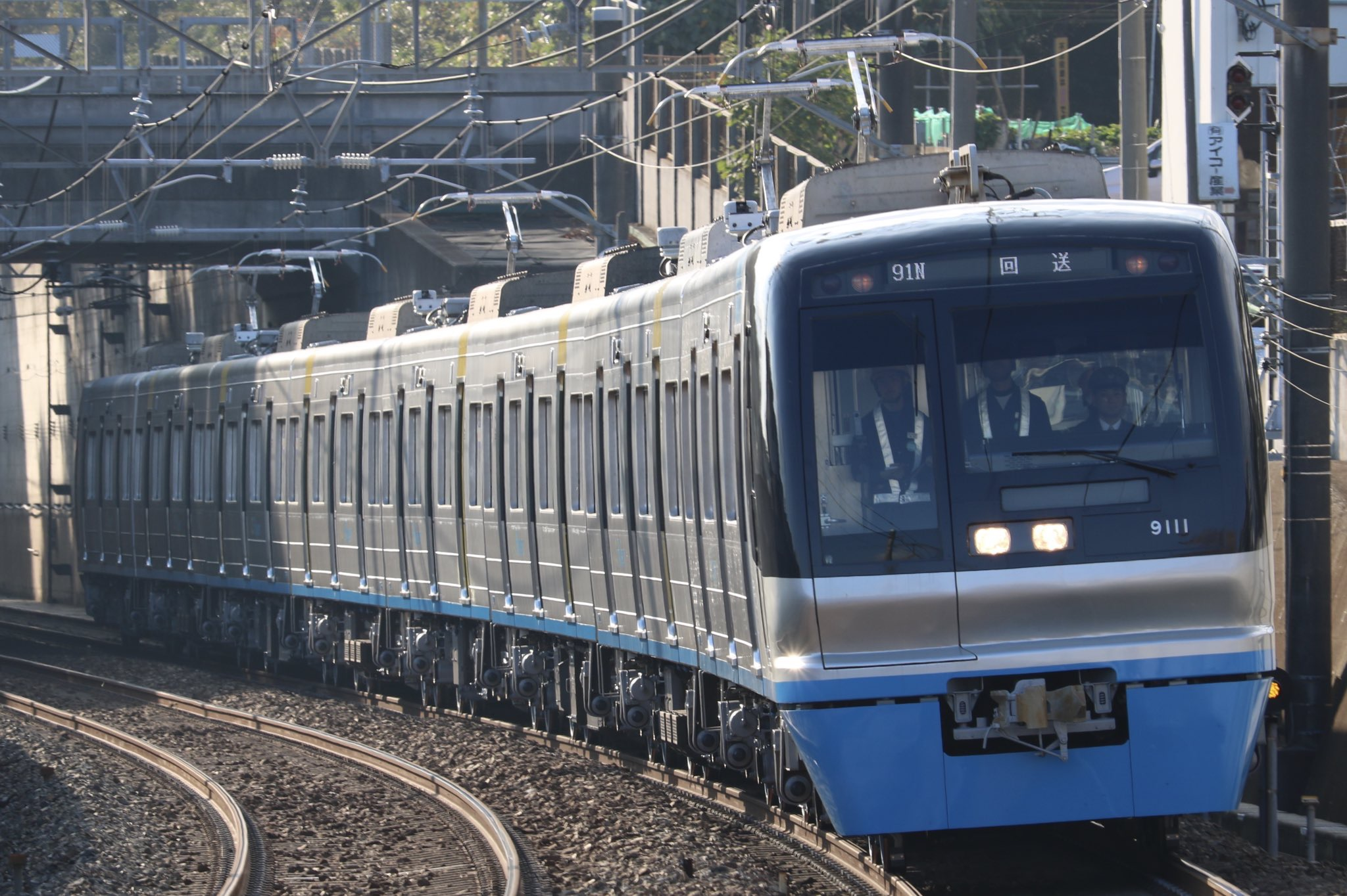 千葉ニュータウン鉄道9100形9118- 北総鉄道松飛台駅